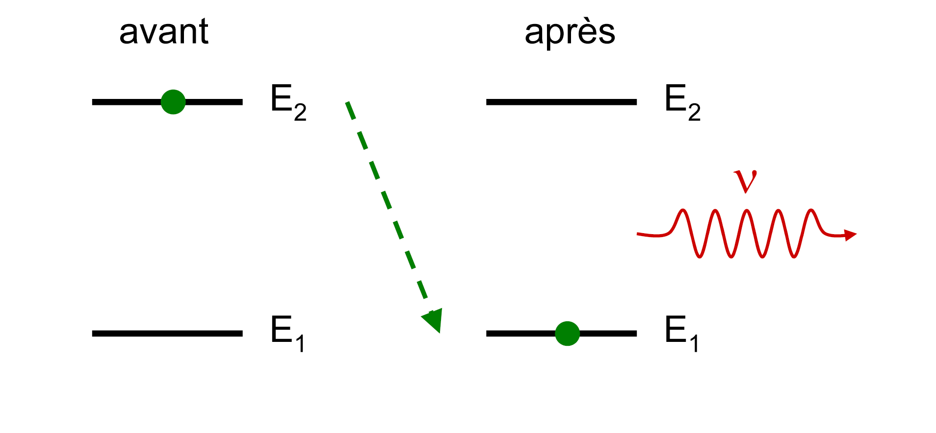 Illustration du phénomène d'émission spontannée